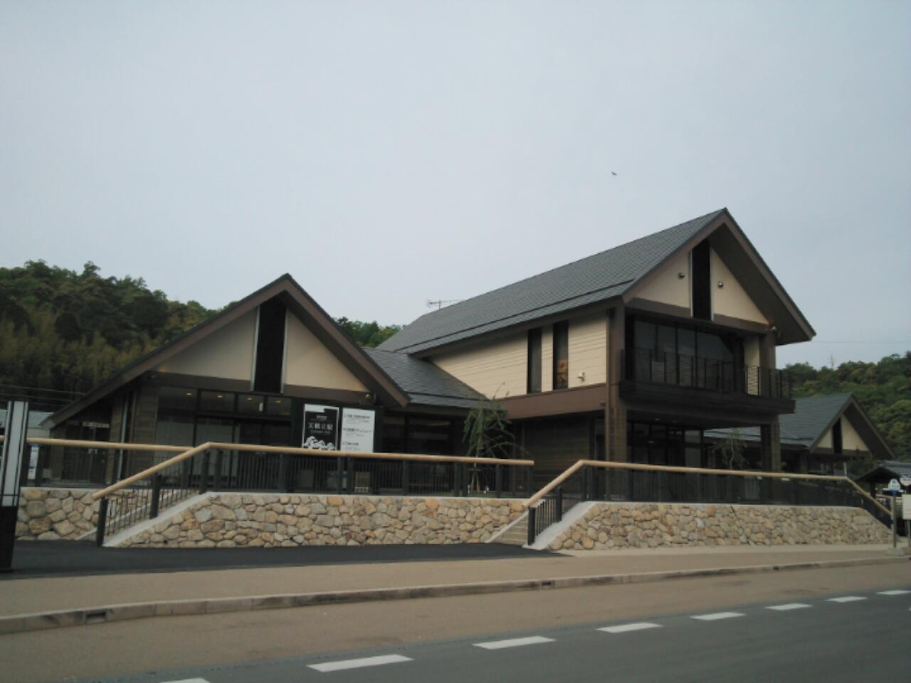 Kyoto Tango Rail Way Amanohashidate station